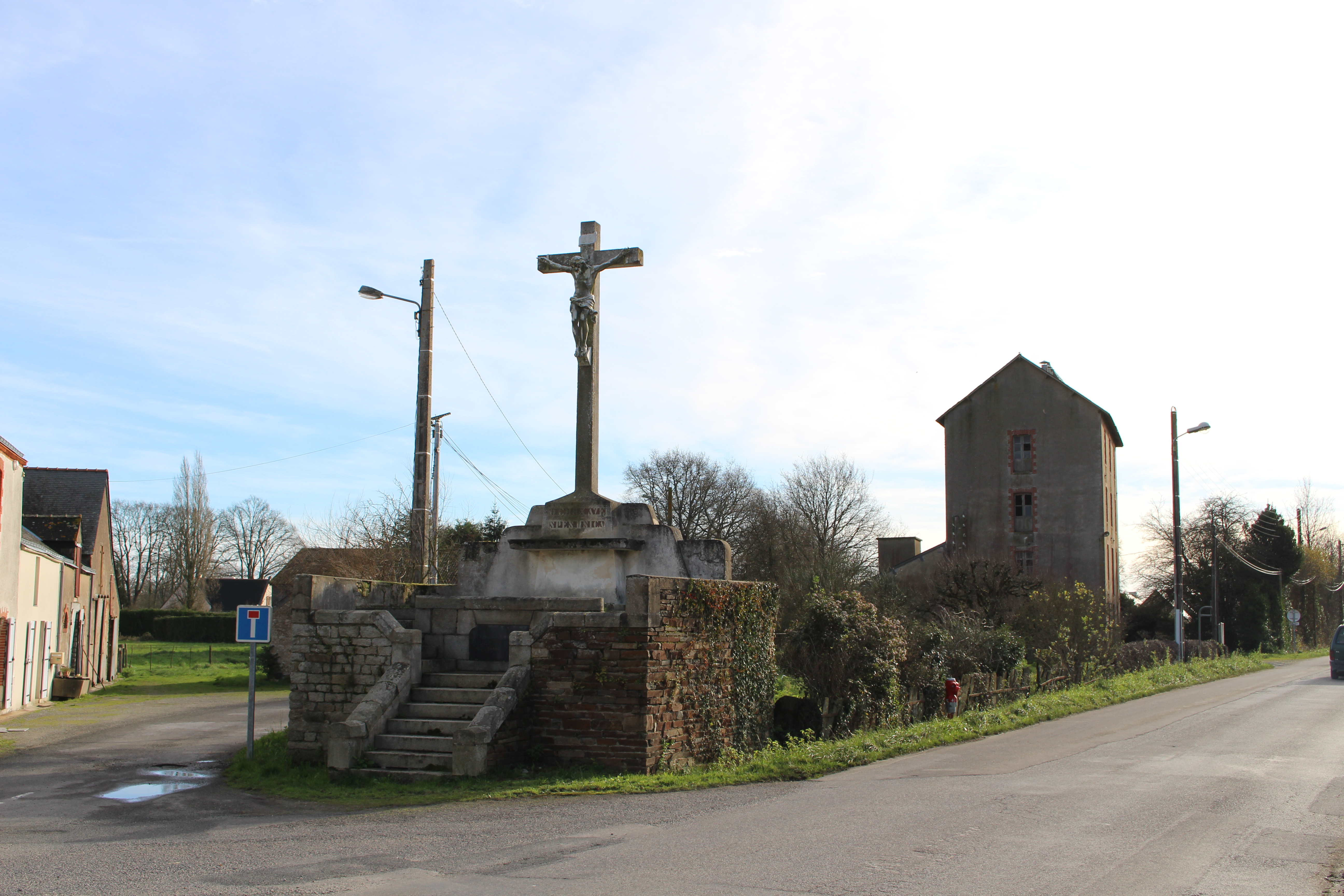 Notre-Dame-des-Landes, Loire-Atlantique